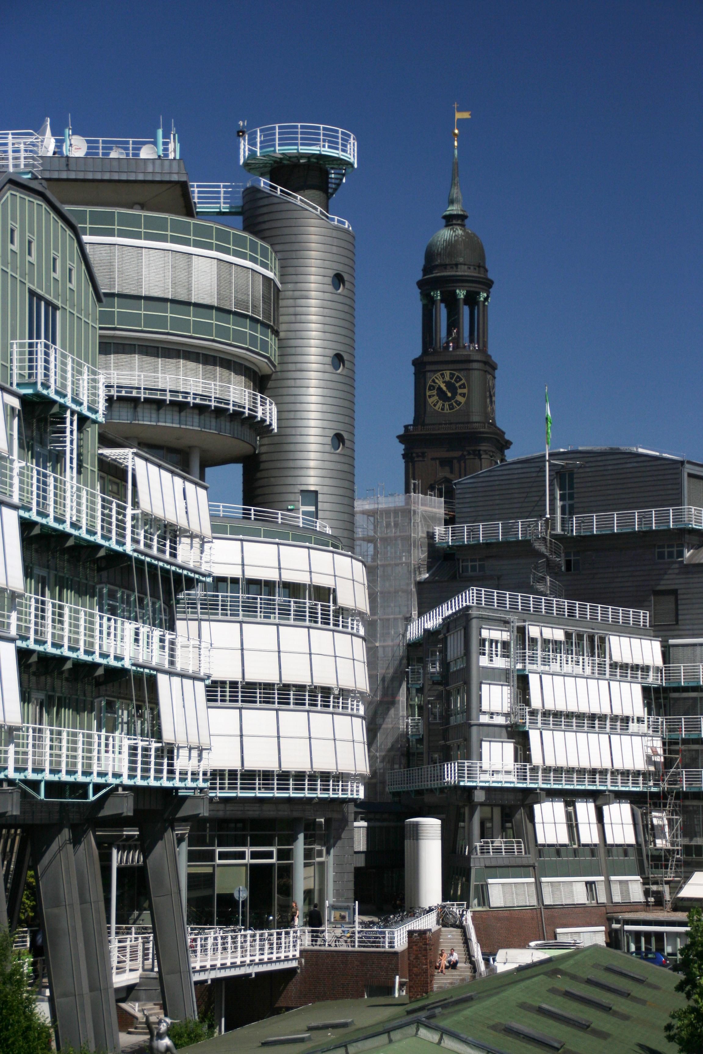 Hamburg 2005-05-26/29 Lukas KURTZ Gruner + Jahr